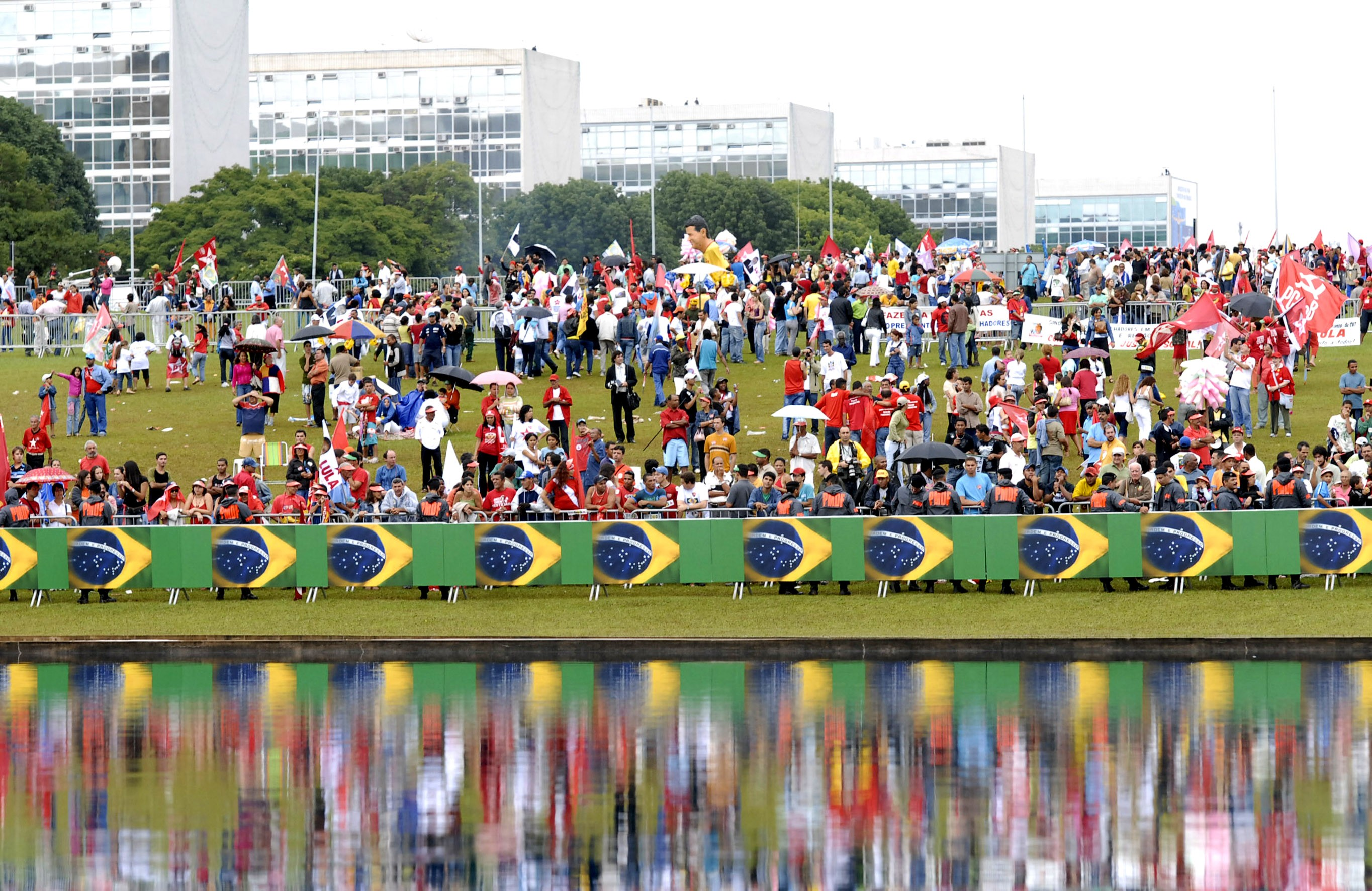 Pessoas diante do espelho d'água do Congresso na posse de 2007 do presidente Lula